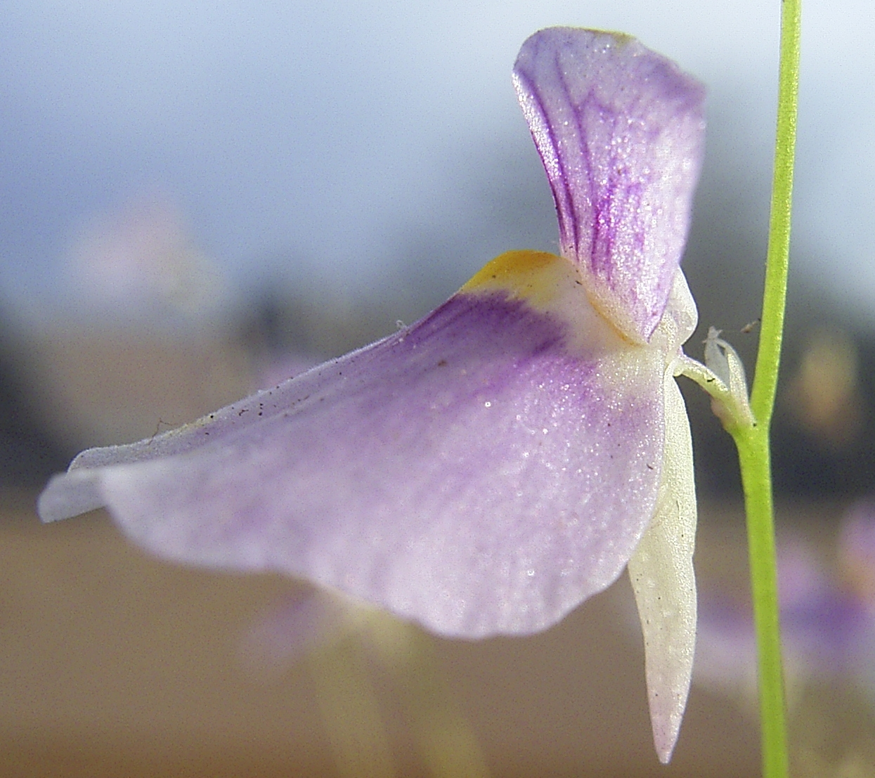 Utricularia blanchetii Flora